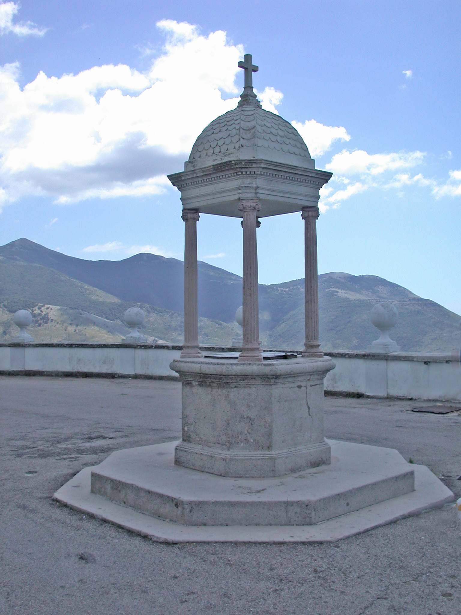 Itri, provincia di Latina, regione Lazio, Italia. Santuario della Madonna della Civita (monte Civita), pozzo sulla terrazza panoramica.